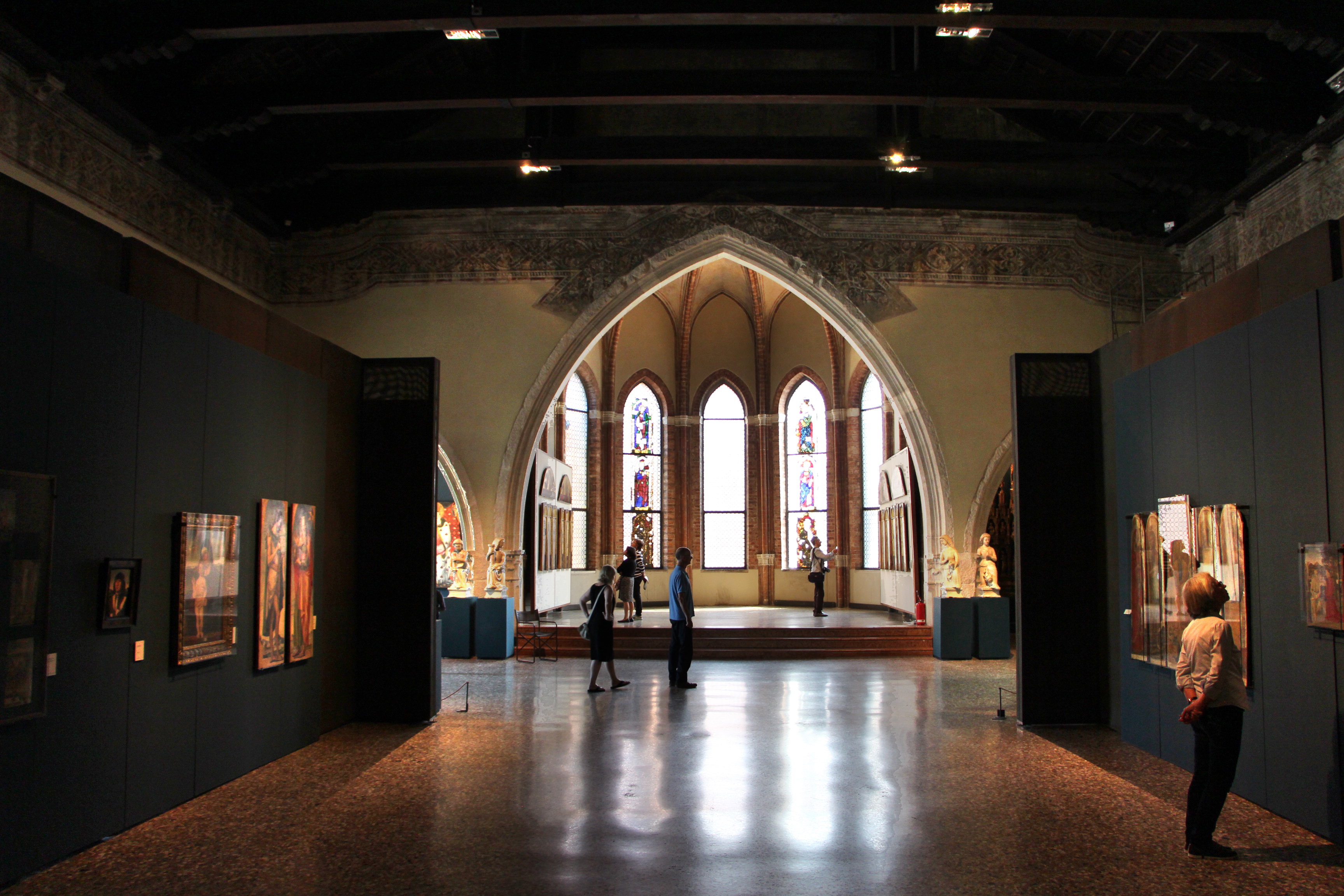 Gallerie dell'Accademia - MIBAC This is a photo of a monument which is part of cultural heritage of Italy.